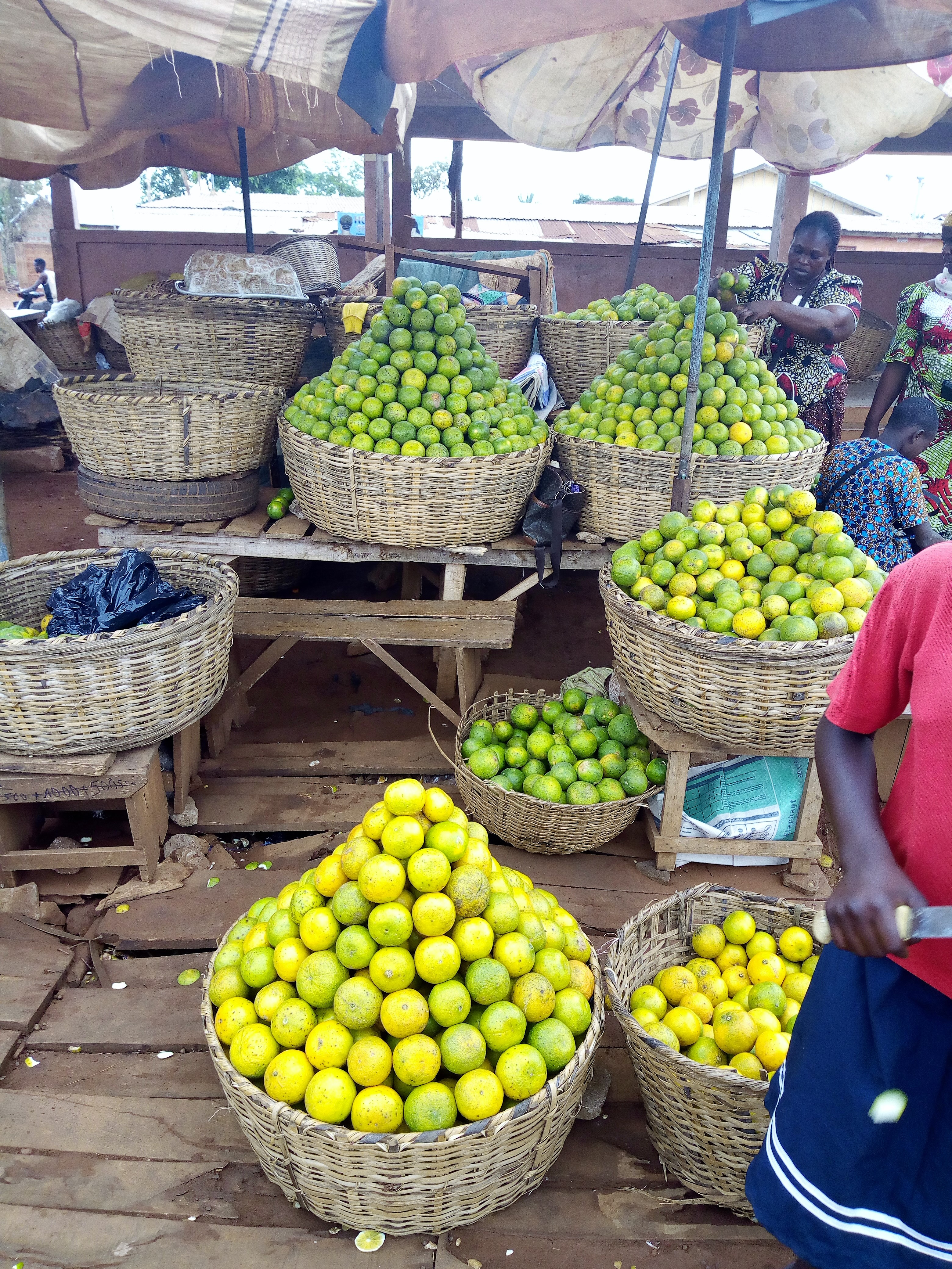 Oranges exposées en paniers à la vente à la gare automobile de Bohicon-Bénin